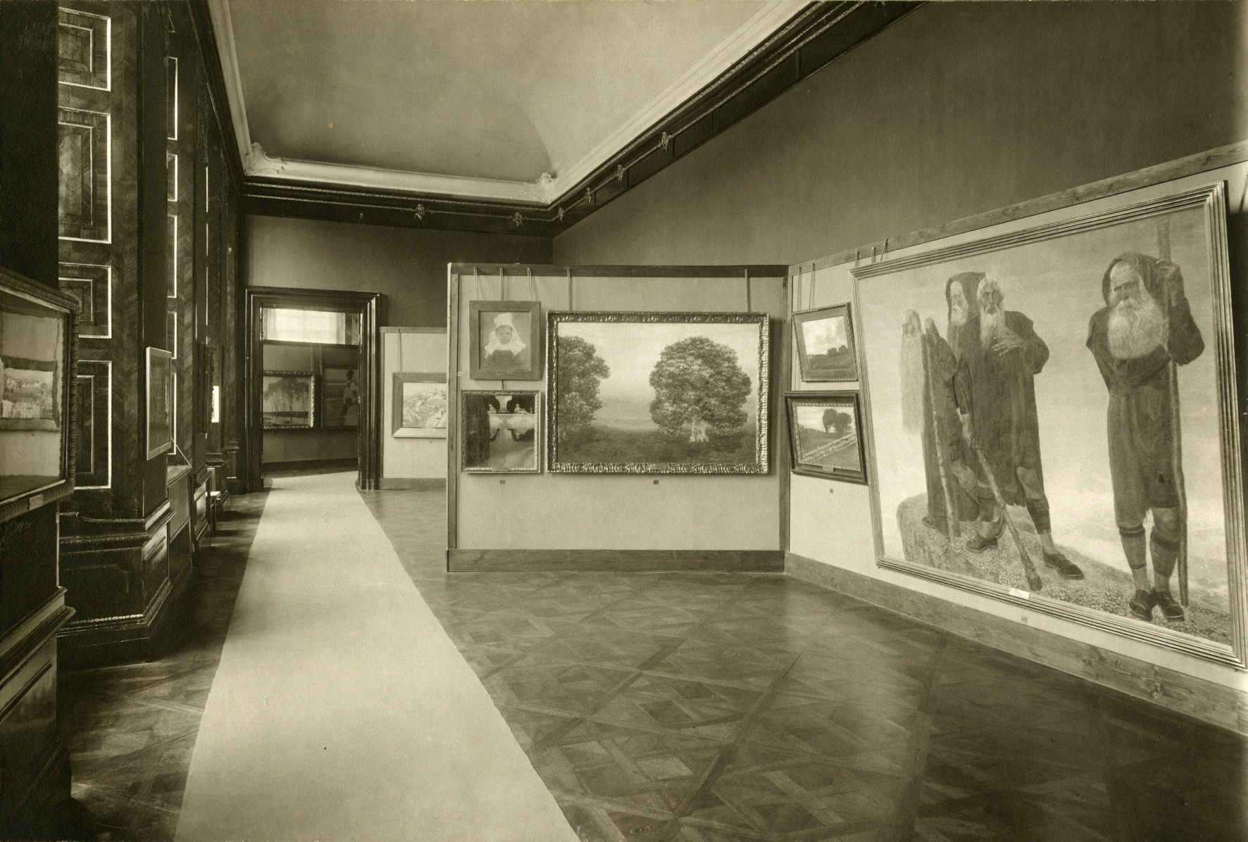 Innenansicht der ehemaligen Modernen Galerie im Unteren Belvedere, Wien.